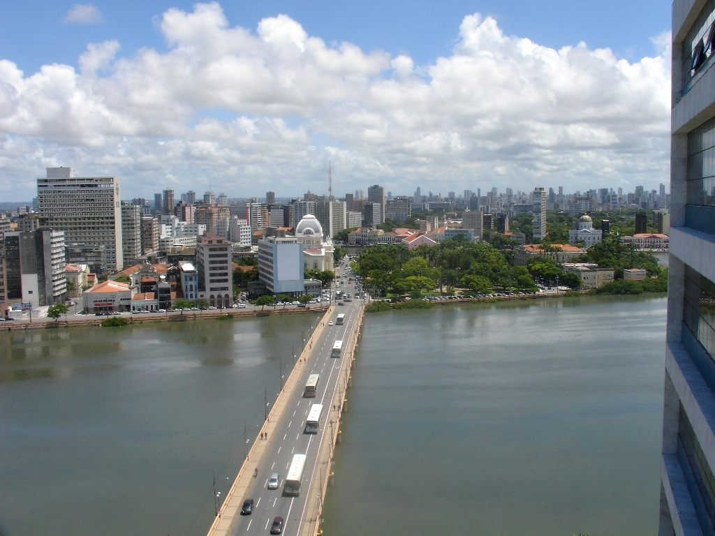 Panorâmica da cidade do Recife, com a Ponte Buarque de Macedo e o Rio Capibaribe. 2011.